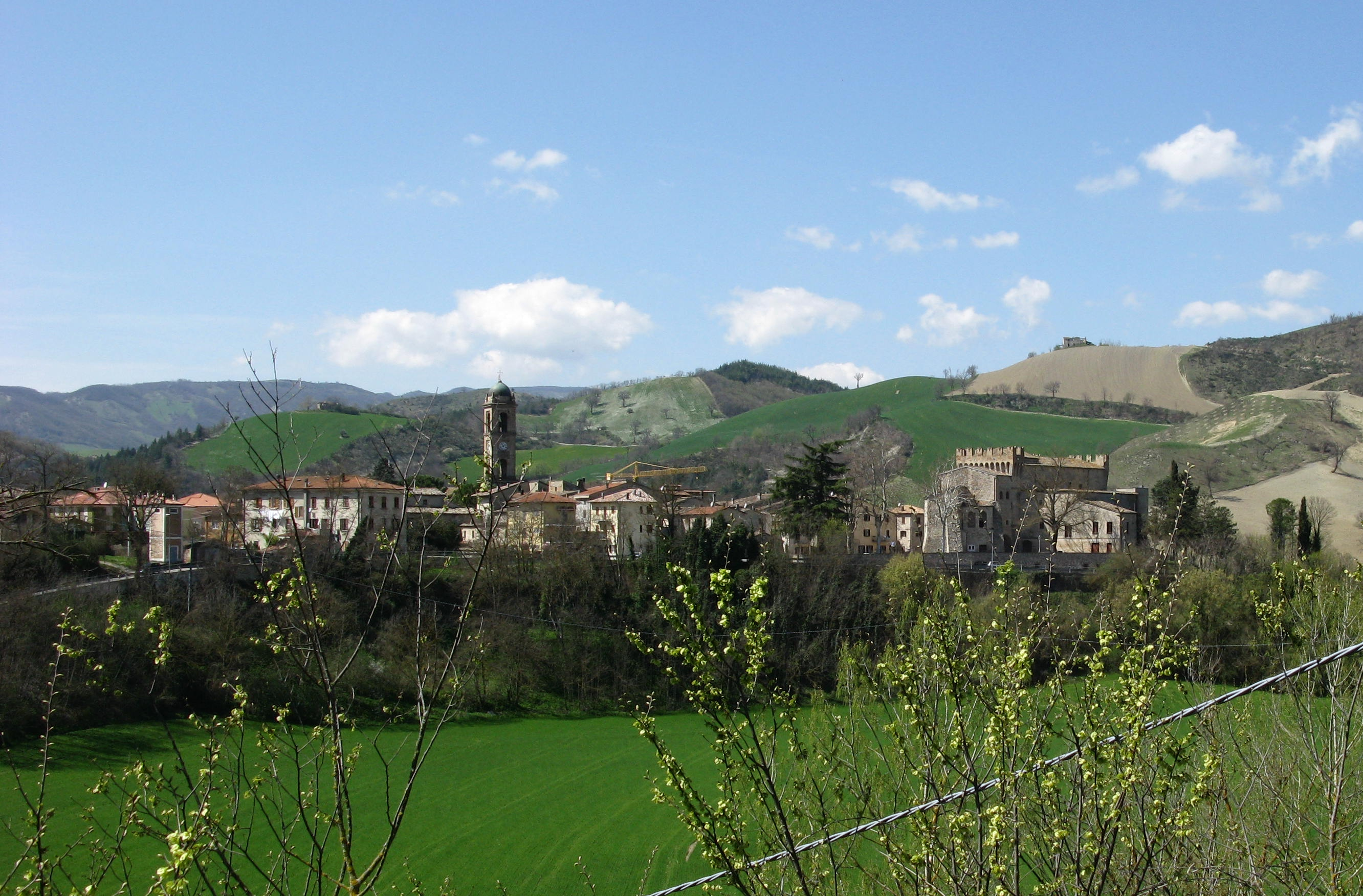 Panorama di Piandimeleto.